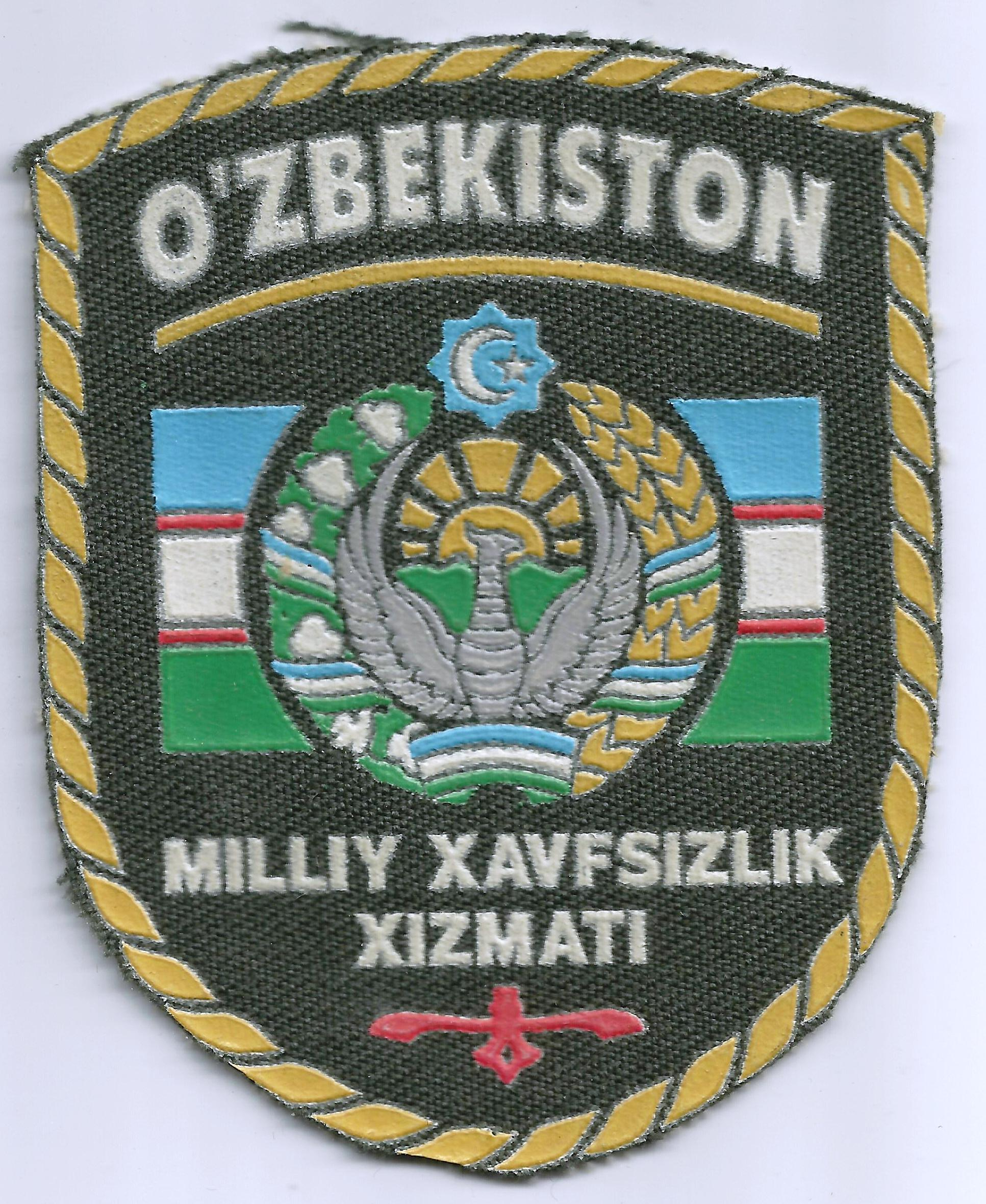 Oezbekistan politie embleem